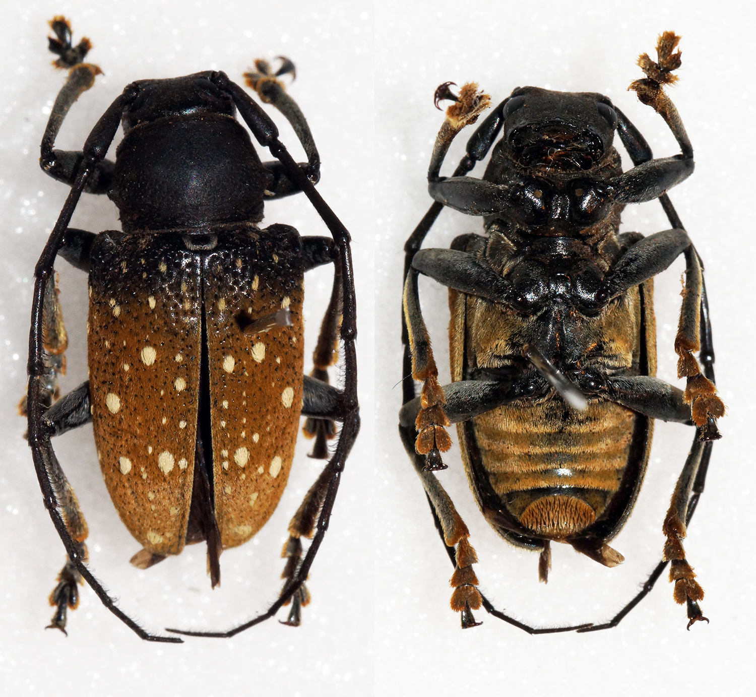 Quedenfeldt,1881 Sex: Male Data: 04-2014 - Kirima - Ituri - Nord Kivu - DR Congo Size: 16mm